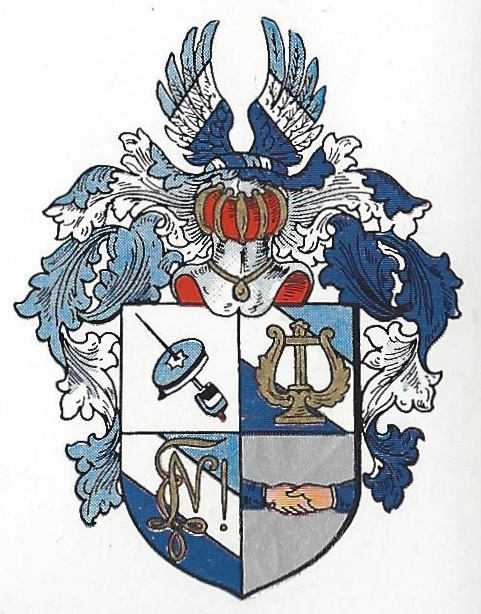 Wappen der Studentenverbindung Nevania zu St. Petersburg